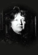 Beatrice Speraz aka Bruno Sperani